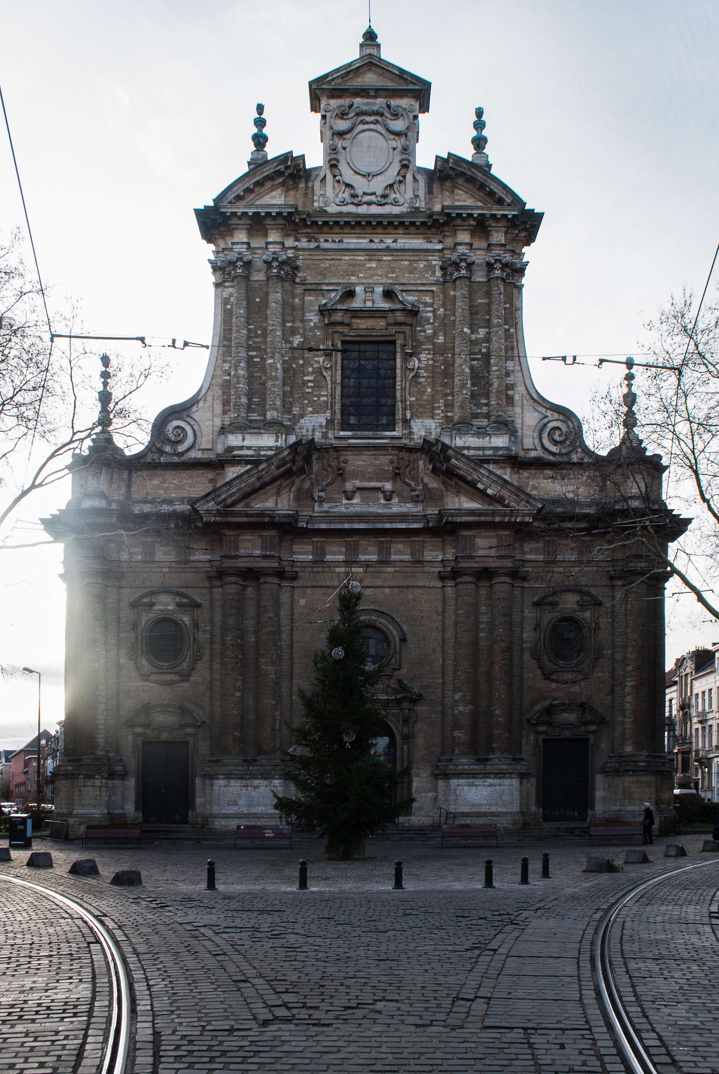 Photo de l'église de la sainte trinité